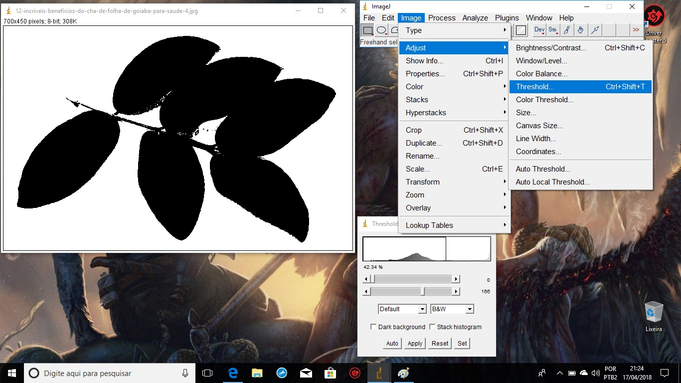 Passo 3.